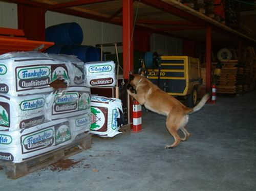 Das Bild zeigt "Brutus le B." (Belgischer Schäferhund vom Typ Malinois), einen Suchtmittelspürhund, beim aktiven Anzeigeverhalten durch Kratzen.